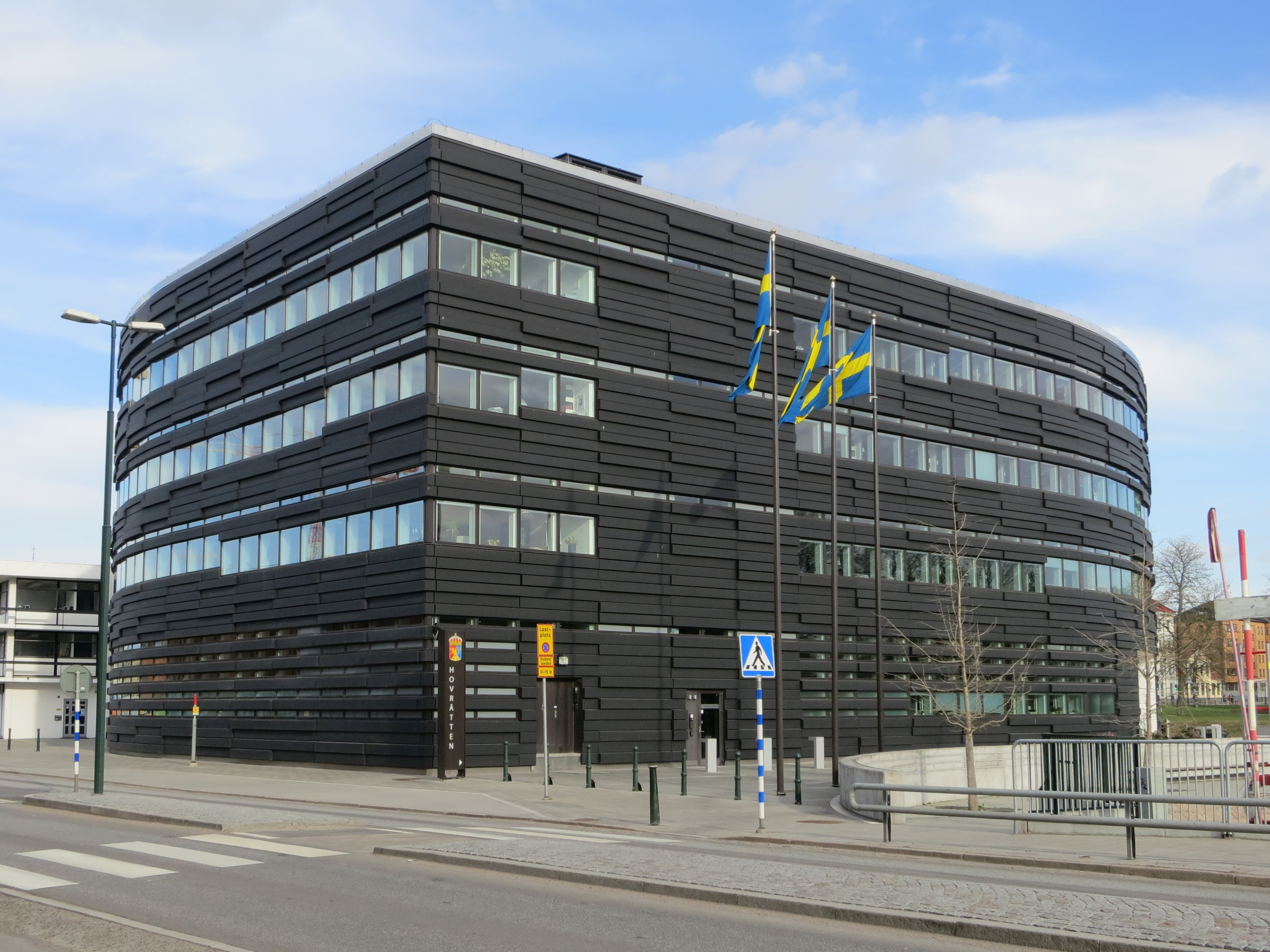 Malmö hovrätt 2013